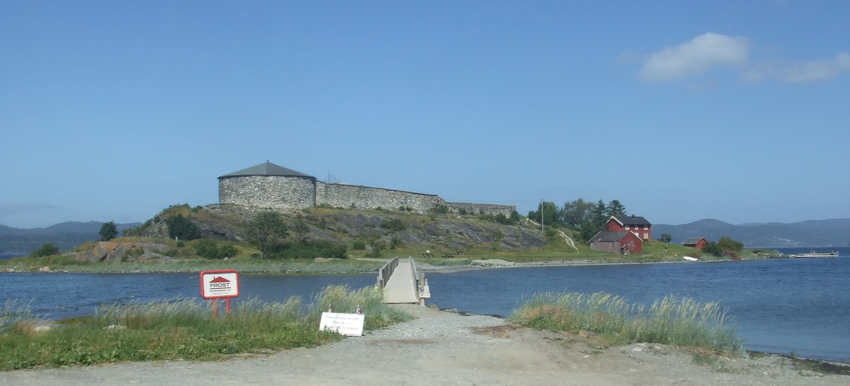 Steinvikholmen sett fra landsiden, sommeren 2008.